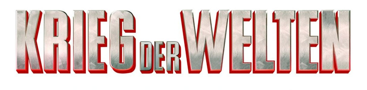 Logo Krieg der Welten (Film)